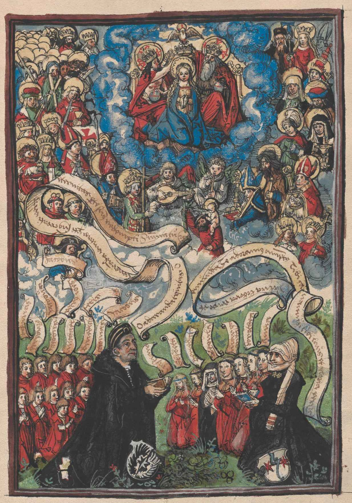 Jakob Mennel mit Familie aus dem "Zaiger", ÖNB Wien Cod. 7892